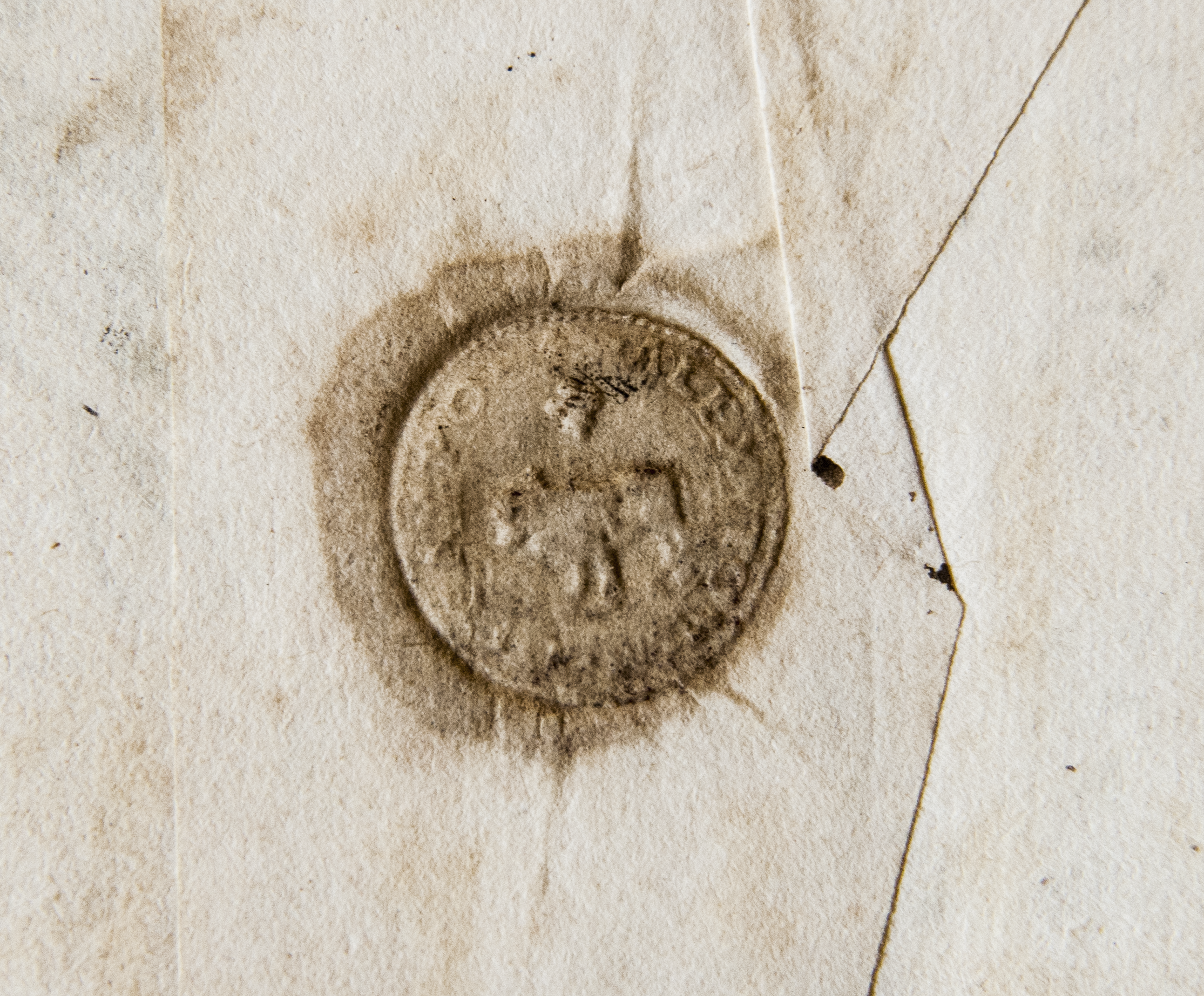 "D'argento al giglio d'oro sopra il toro passante di nero e bianco", con scritta: ALEX - TOM - M - DI - CAMPO.